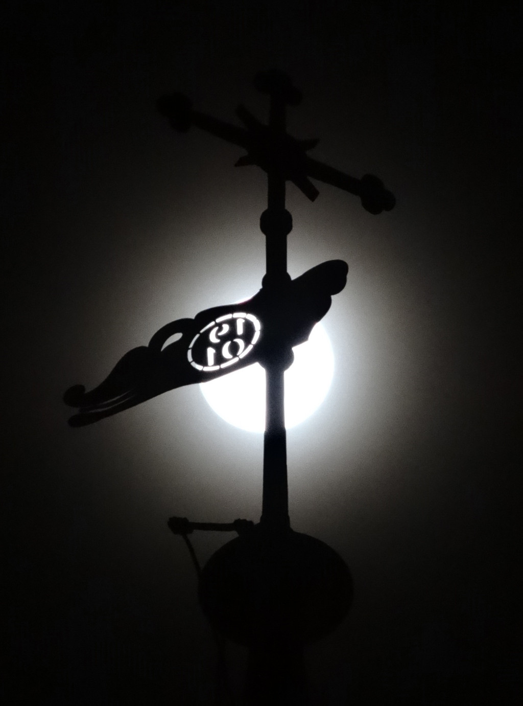 Kościół p.w. Wniebowzięcia Najświętszej Marii Panny w Bydgoszczy (zbud. 1582-1615, do 1835 r. kościół klasztorny klarysek bydgoskich)